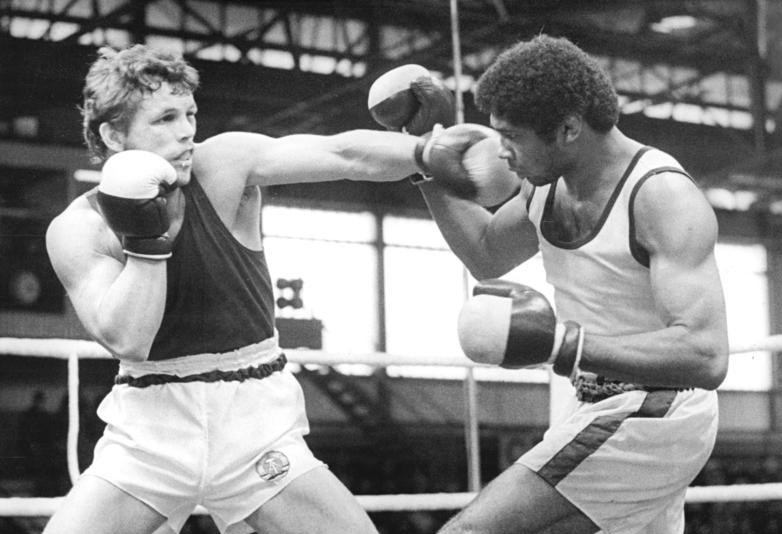 Detlef Kästner, Armando Martinez ADN-ZB Lehmann 13.3.82 Halle: XI. Internationales Boxturnier um den Chemiepokal-Finale - Im Halbmittelgewicht lieferte der 23-jährige Olympiadritte Detlef Kästner (DDR-links) dem Olympiasieger von Moskau, Armando Martinez (Kuba), eine kämpferisch ausgezeichnete Partie und unterlag nur äußerst knapp mit 2:3-Richterstimmen nach Punkten.